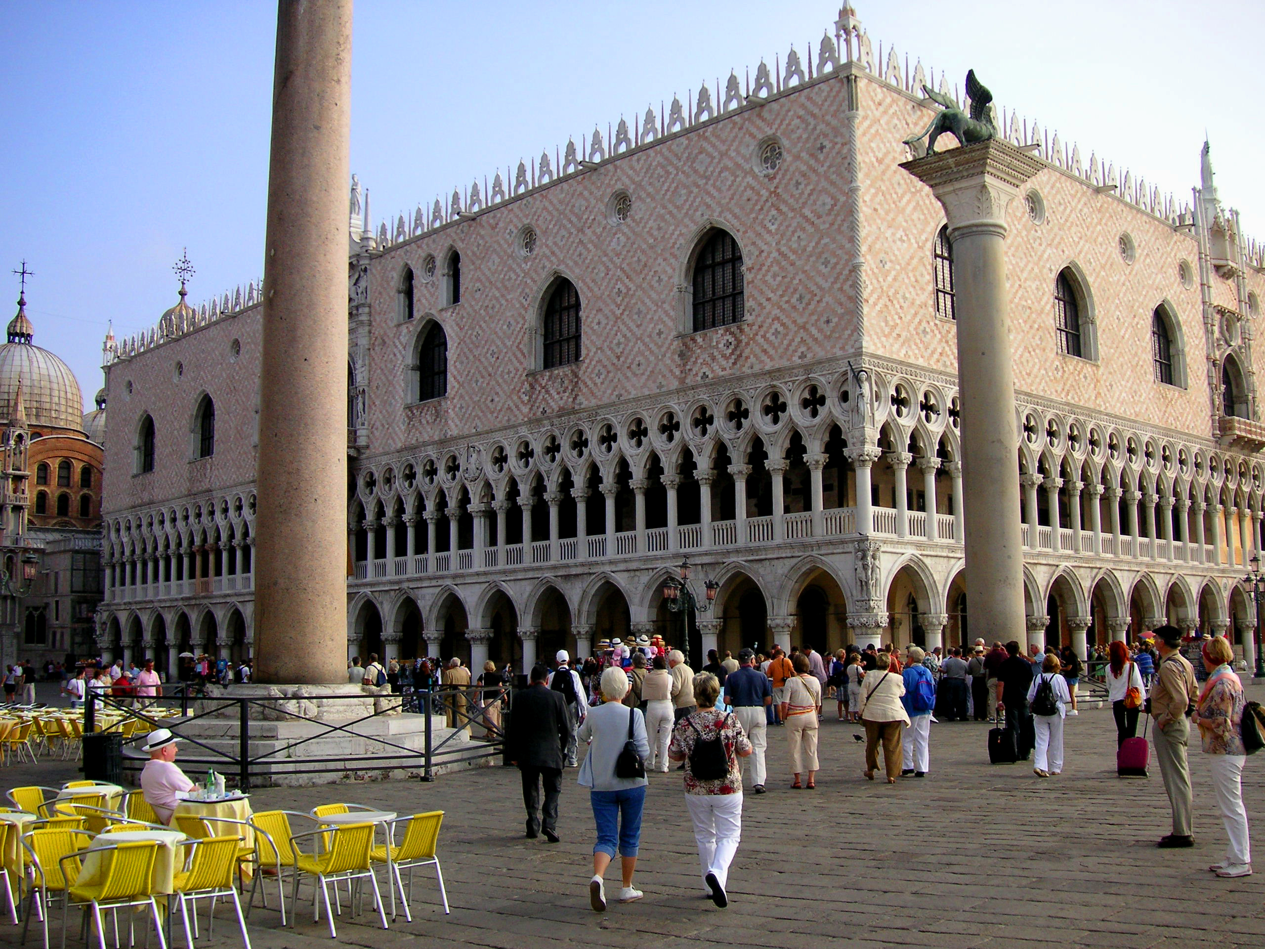 Palazzo Ducale in Venedig, Italien